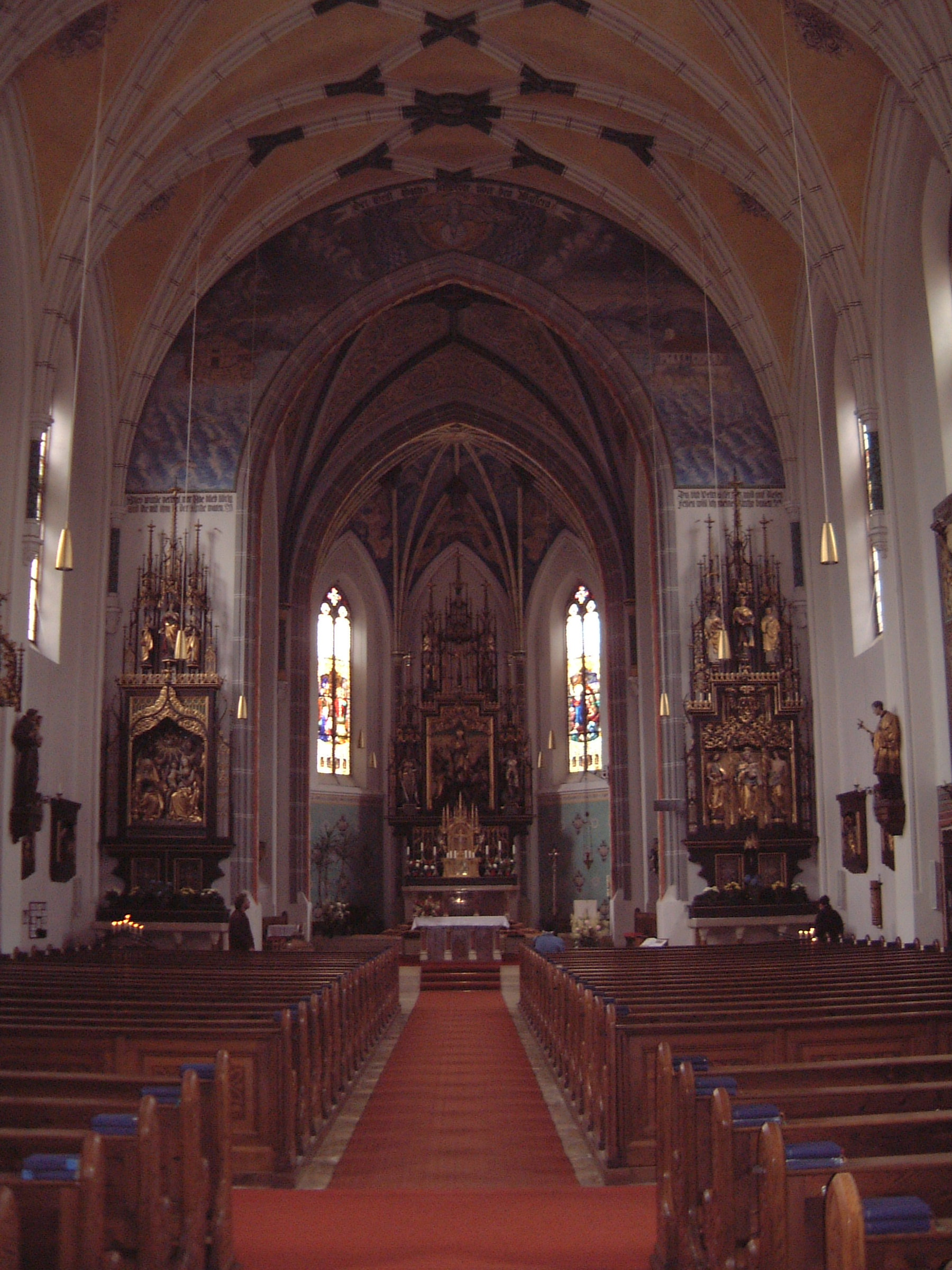 Übersee am Chiemsee: Innenansicht der Kath. Pfarrkirche St. Nikolaus, erbaut 1902-1904 von Architekt Joseph Elsner